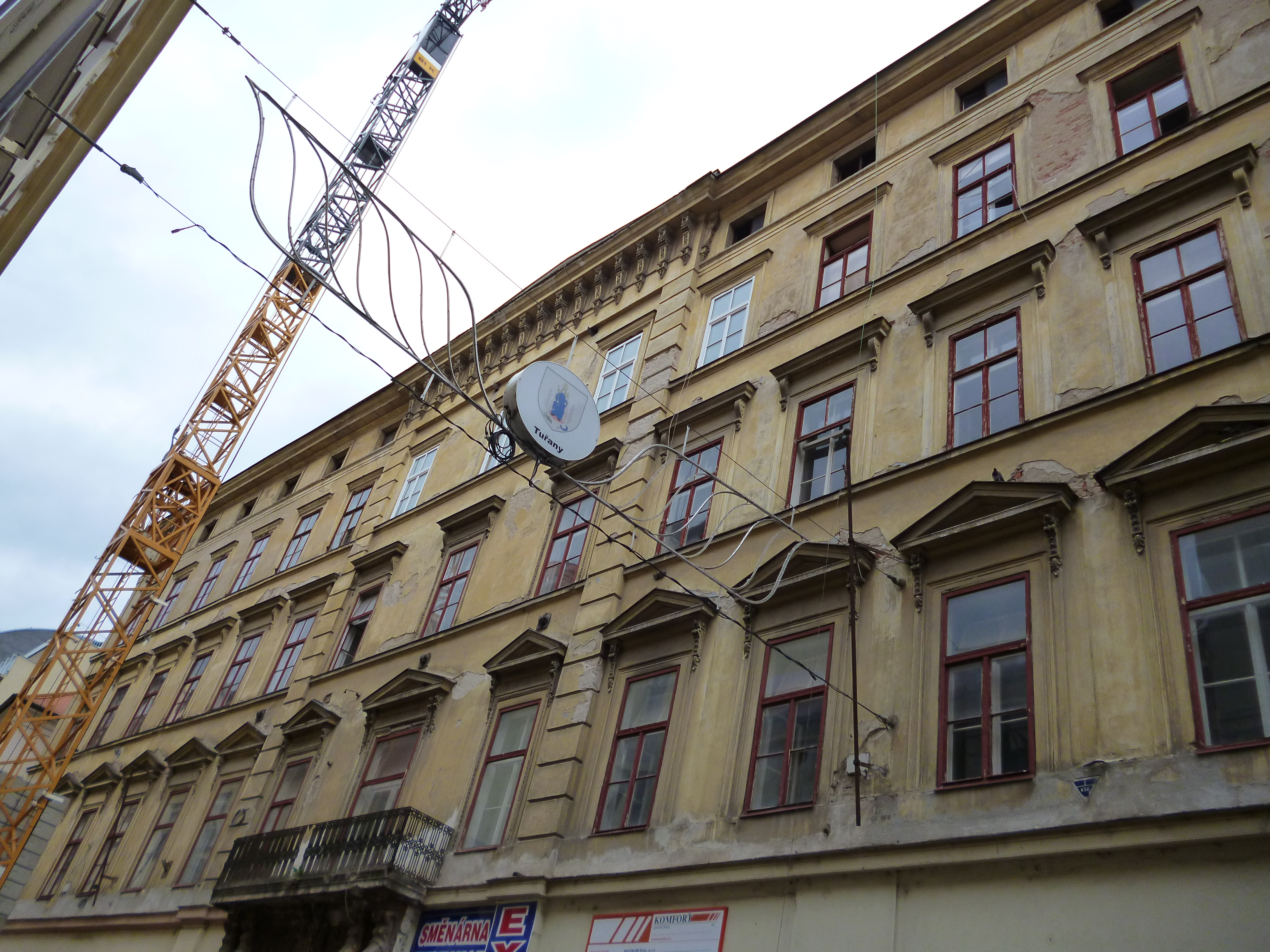 Činžovní dům (Brno), Brno - město, Česká, Jakubská 156/2, Brno